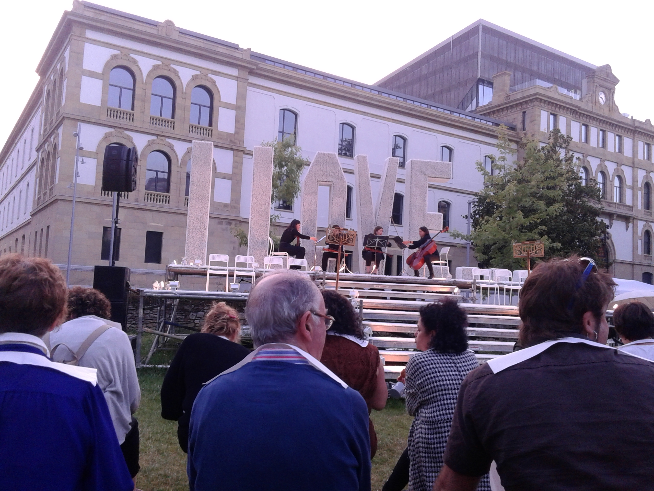 Glady-enea parkean Shakespearen lanaren bertsioa egin zen.